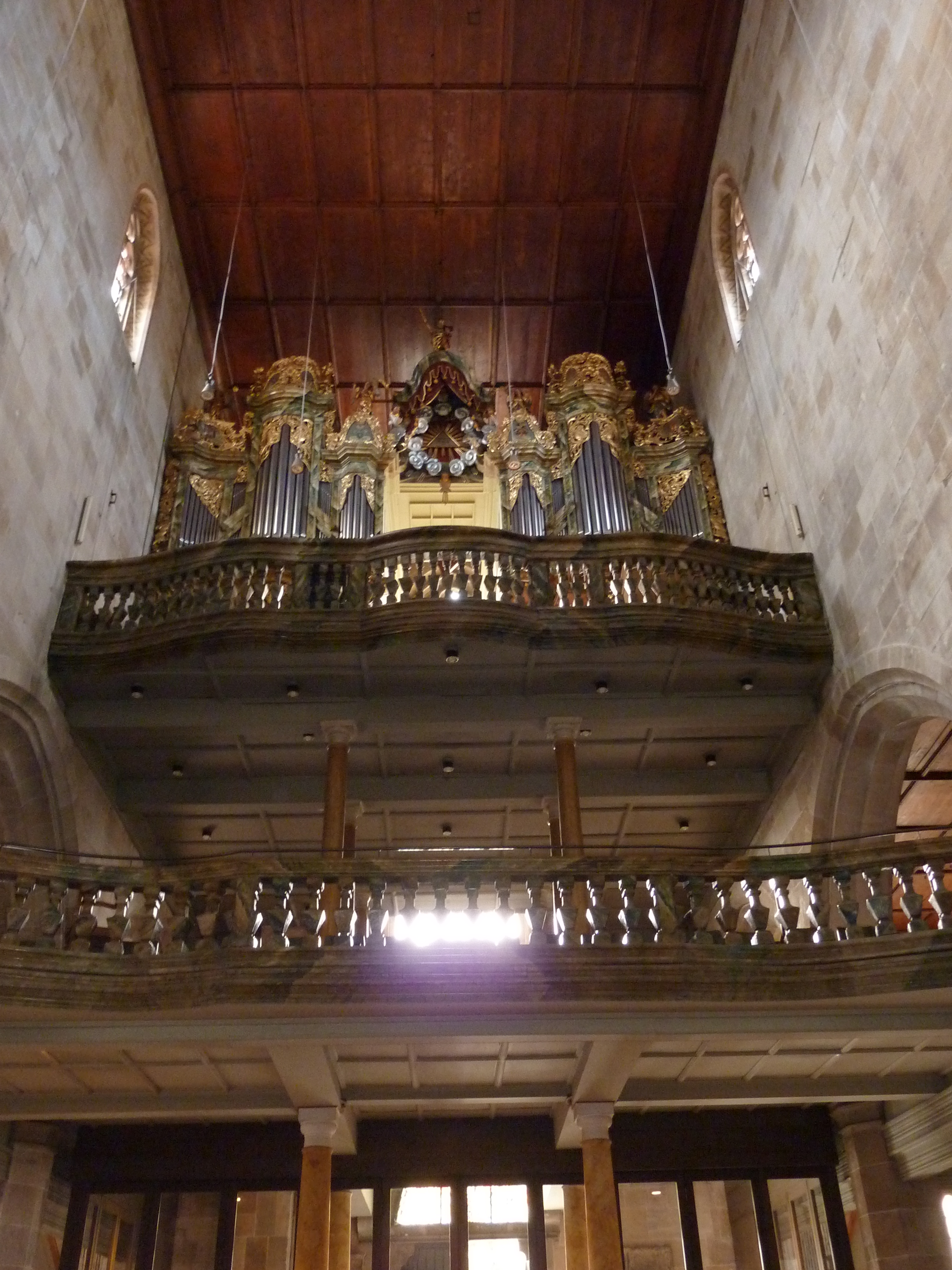 Orgel und Empore der ev. Stadtkirche St. Dionys, Esslingen